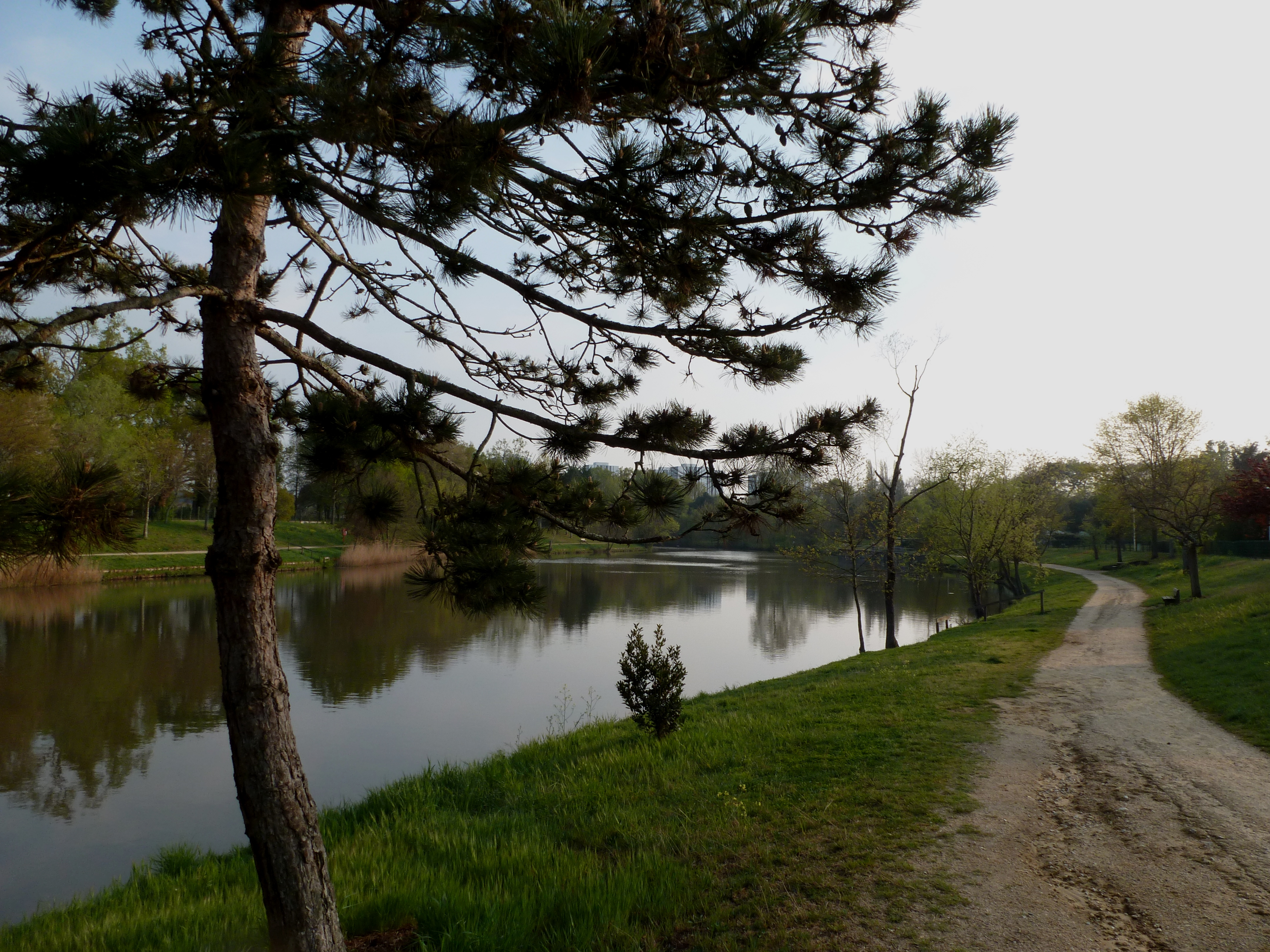 Parc et étang artificiel de Fontaudin au printemps à Pessac-33.